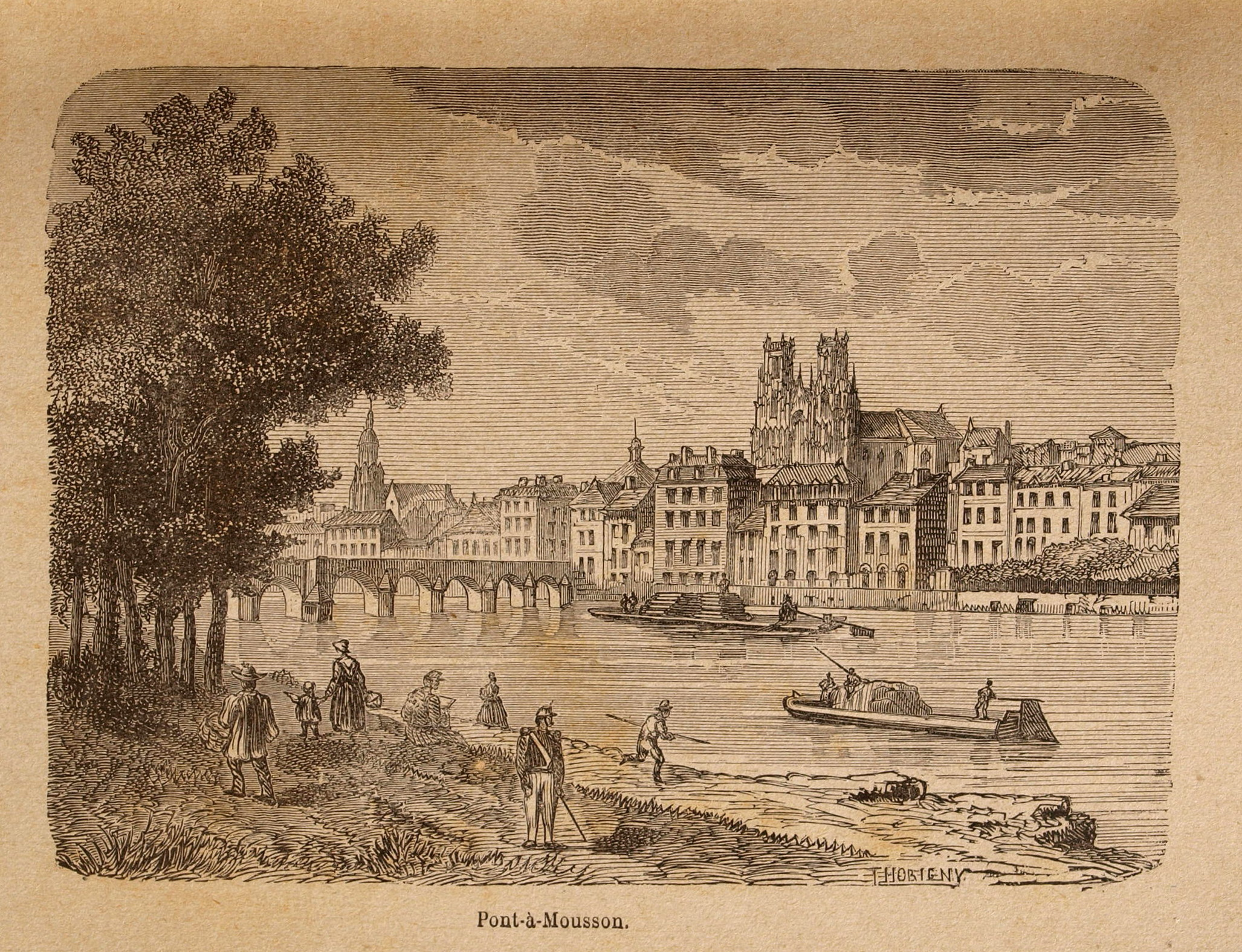 Pont-à-Mousson (Lorraine, France) , vieille gravure